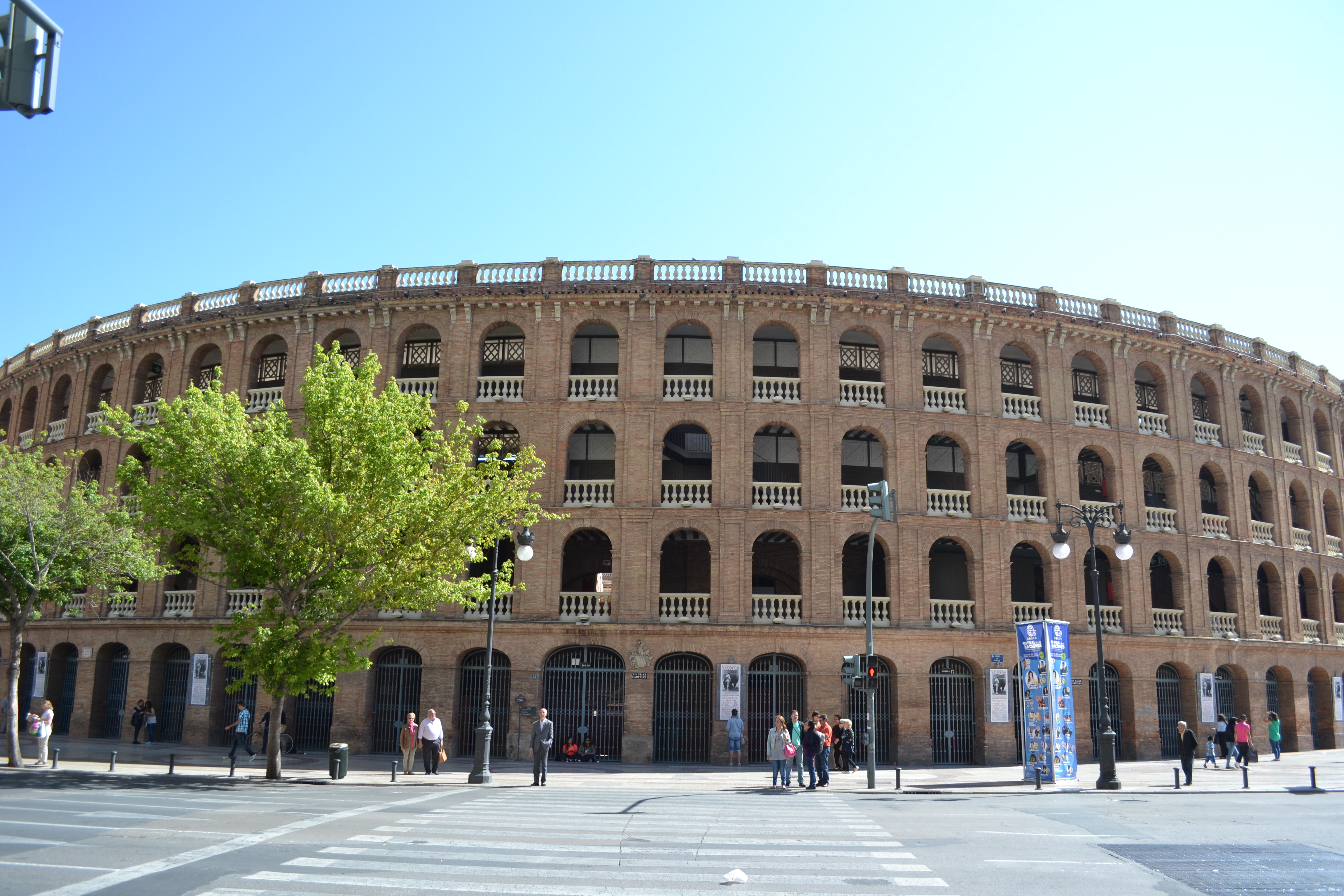 Plaza de toros de Valencia.